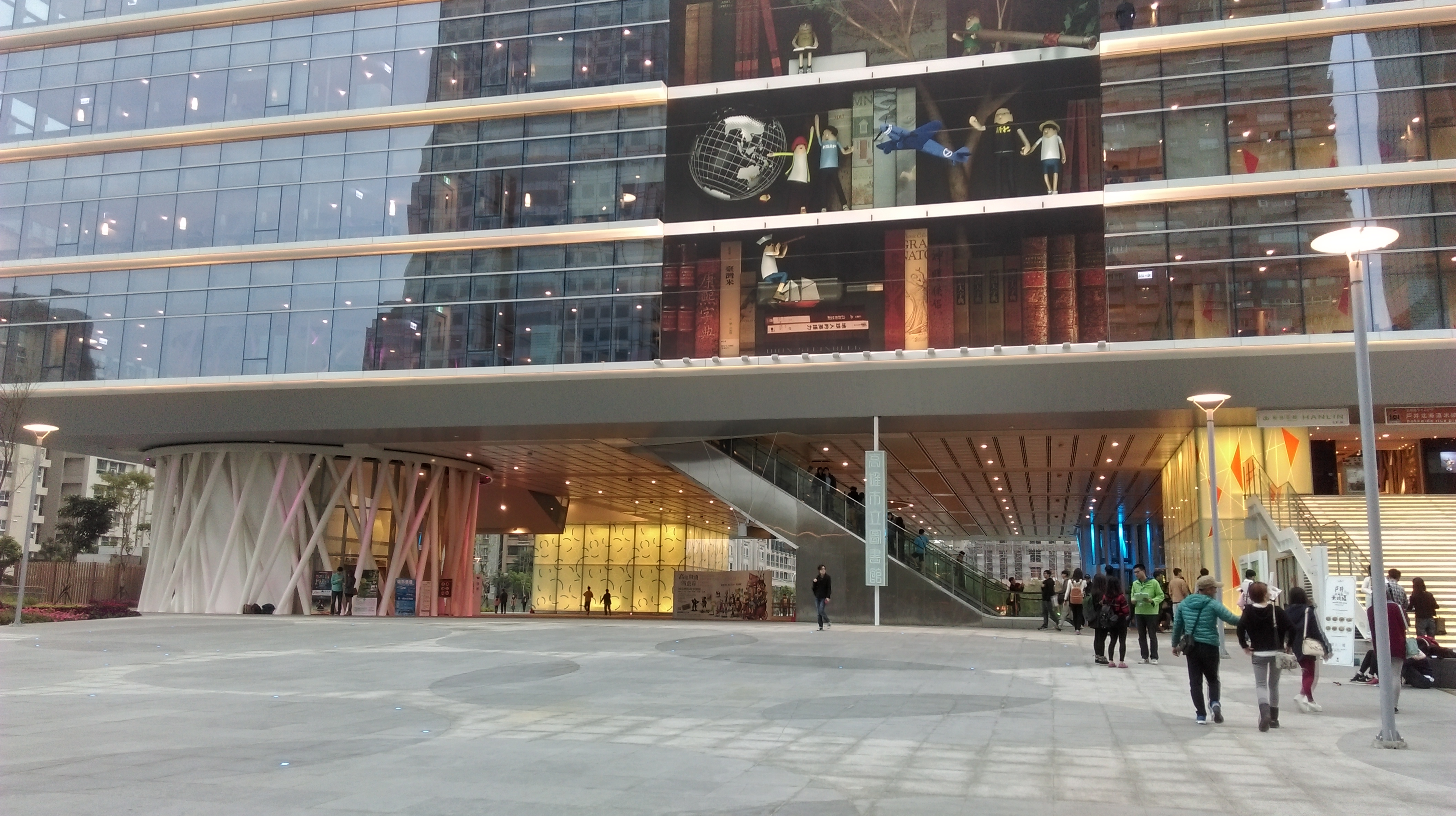 高雄市立圖書館總館外觀